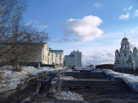 Вознесенская горка, Екатеринбург